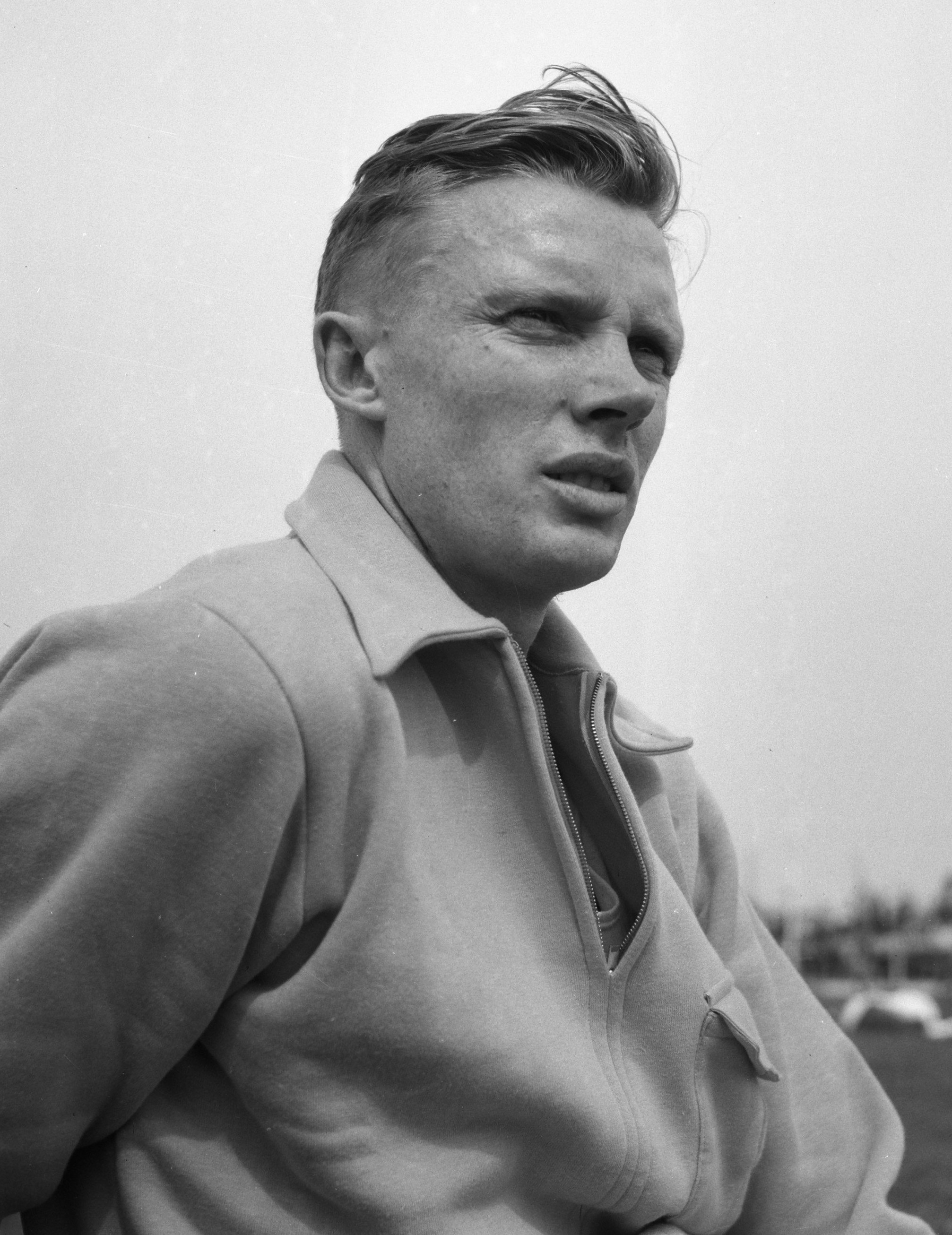 Jo Zwaan